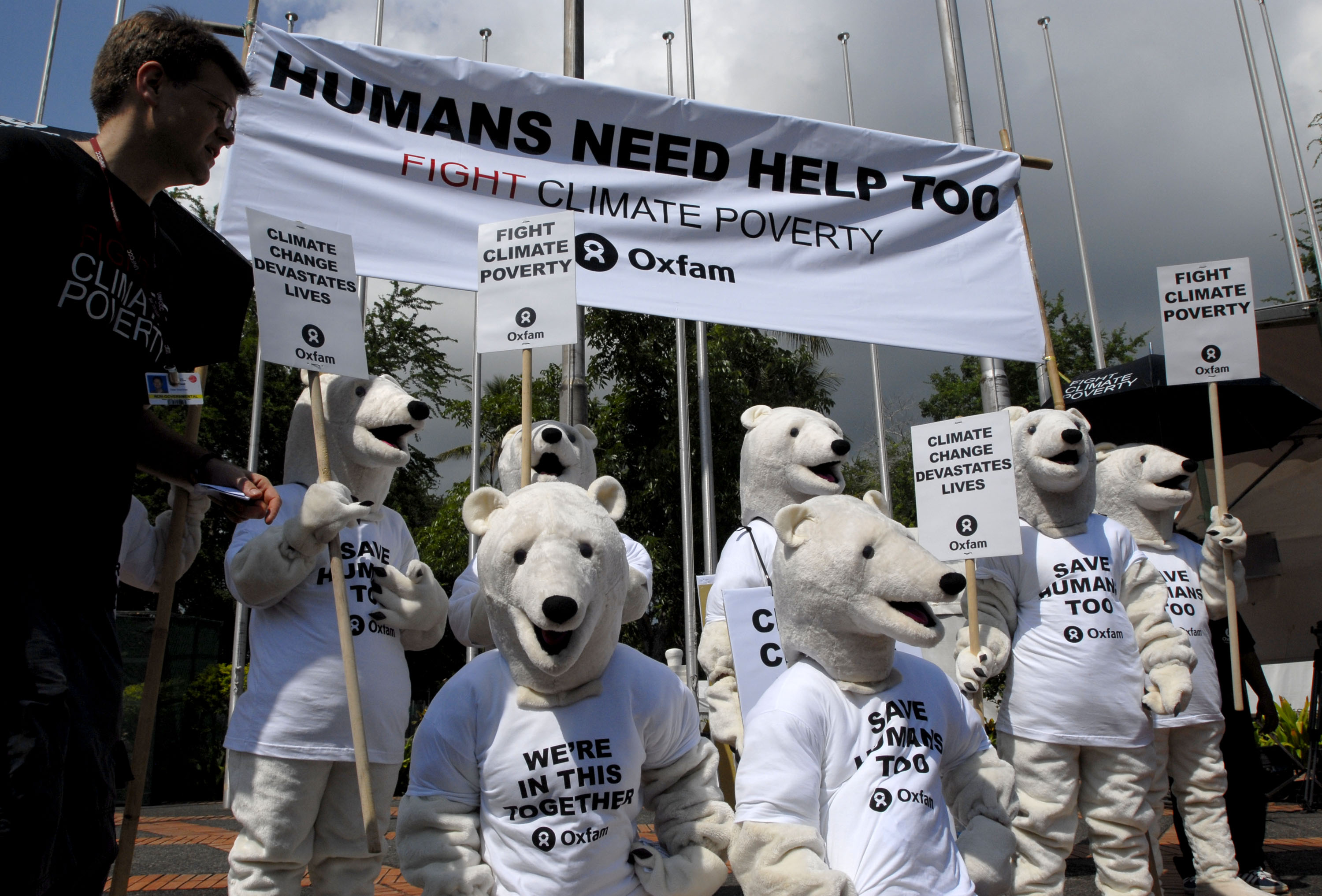 Photo Ng Swan Ti